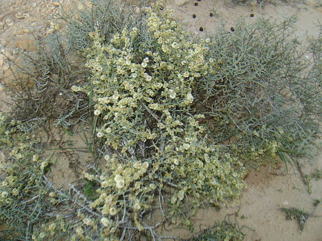 famille des Chénopodiacées